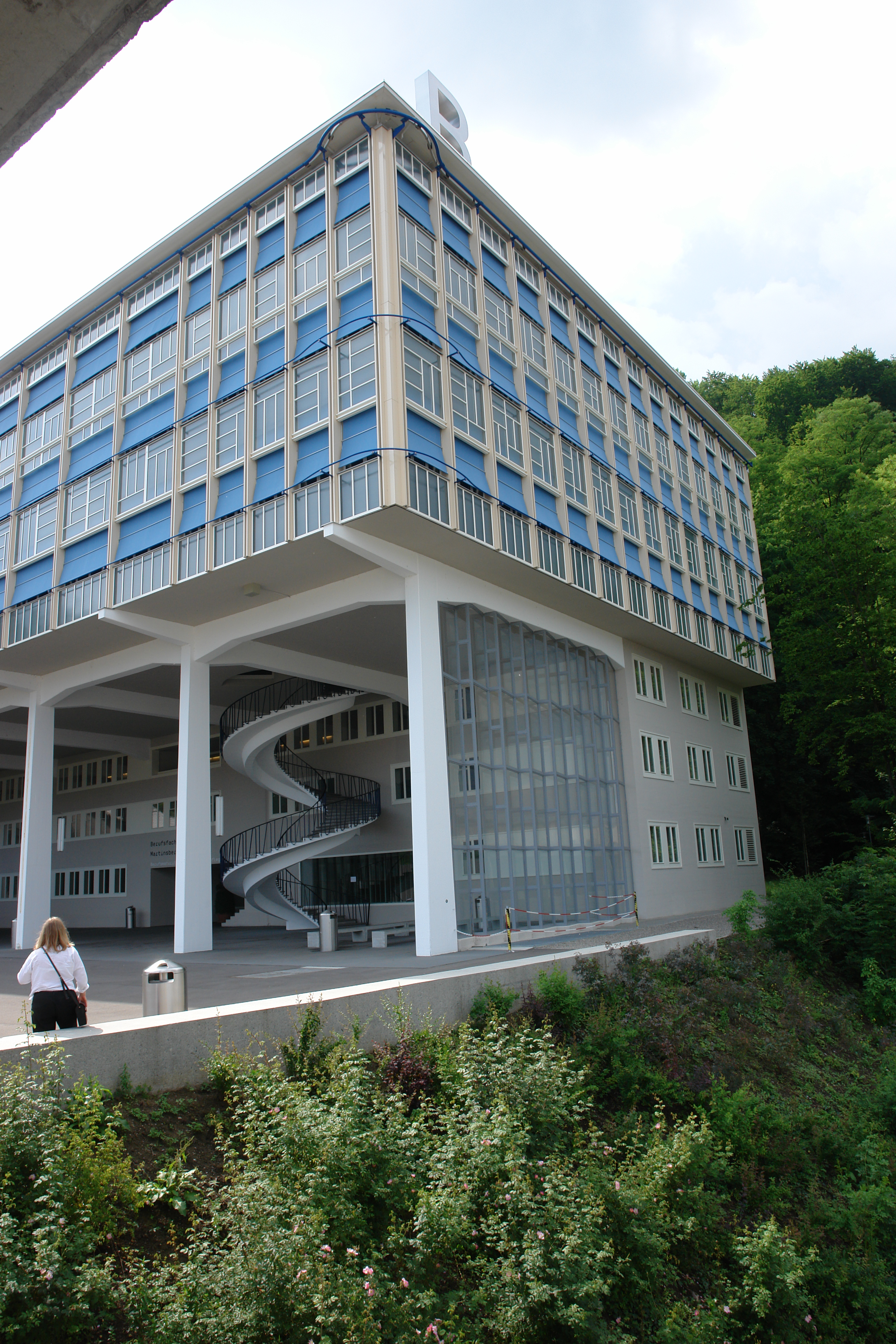 Gemeinschaftshaus der ABB, Baden Architekt: Armin Meili